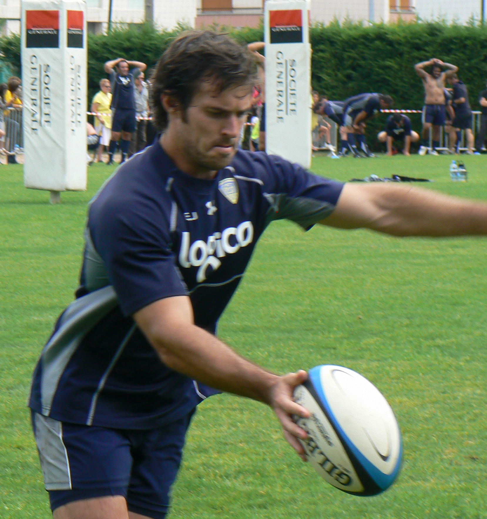 Le rugbyman australien Brock James lors d'un entraînement avec l'ASM Clermont Auvergne.